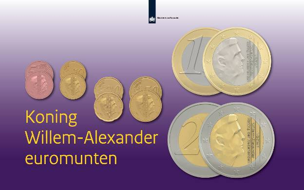 De nieuwe munten met het portret van Koning Willem-Alexander, vanaf de tweede helft van januari 2014 geslagen door de Koninklijke Nederlandse Munt. Direct daarna komen ze in circulatie. et ontwerp voor de nieuwe muntreeks met daarop Koning Willem-Alexander is gemaakt door fotograaf Erwin Olaf.